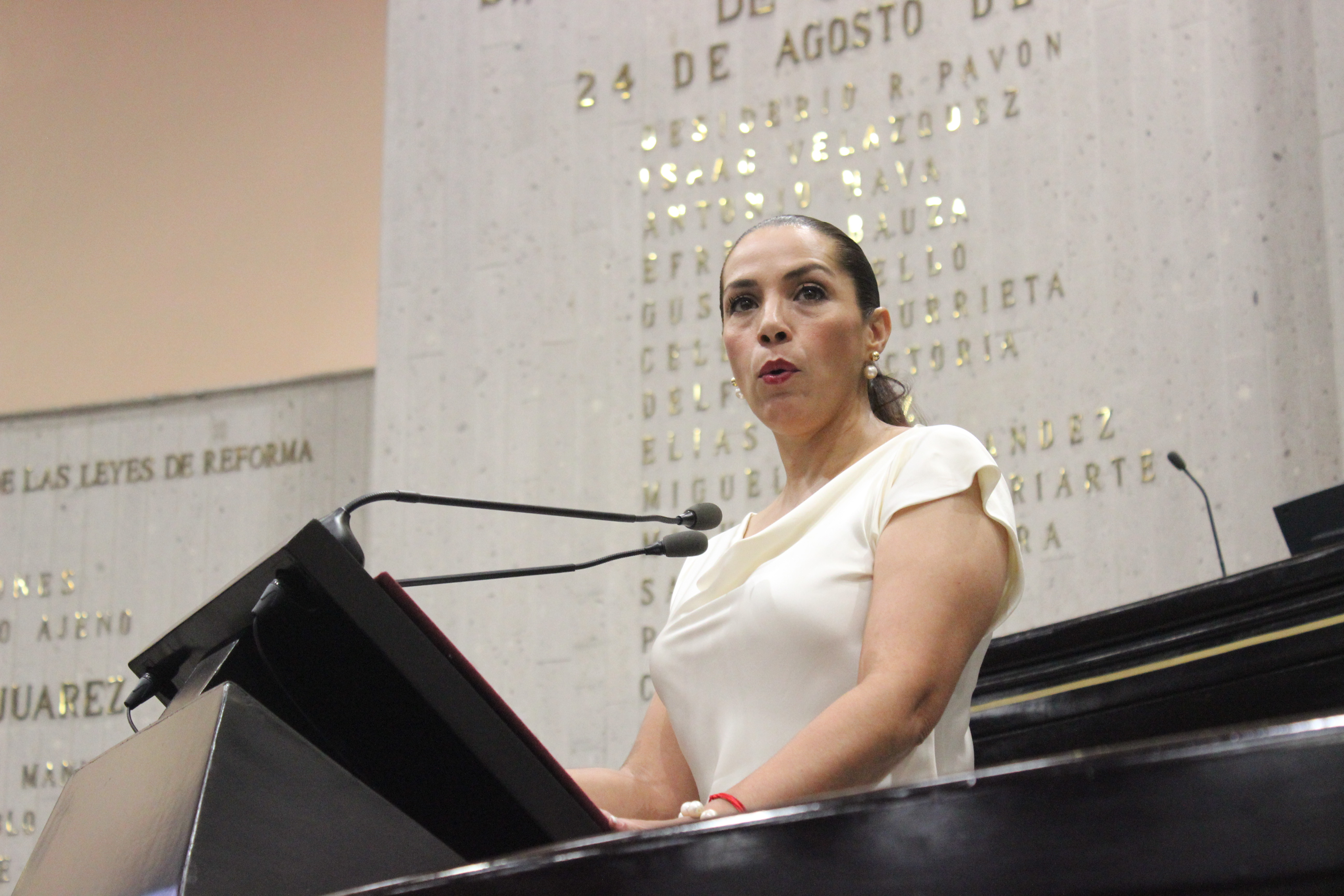 Foto sesión